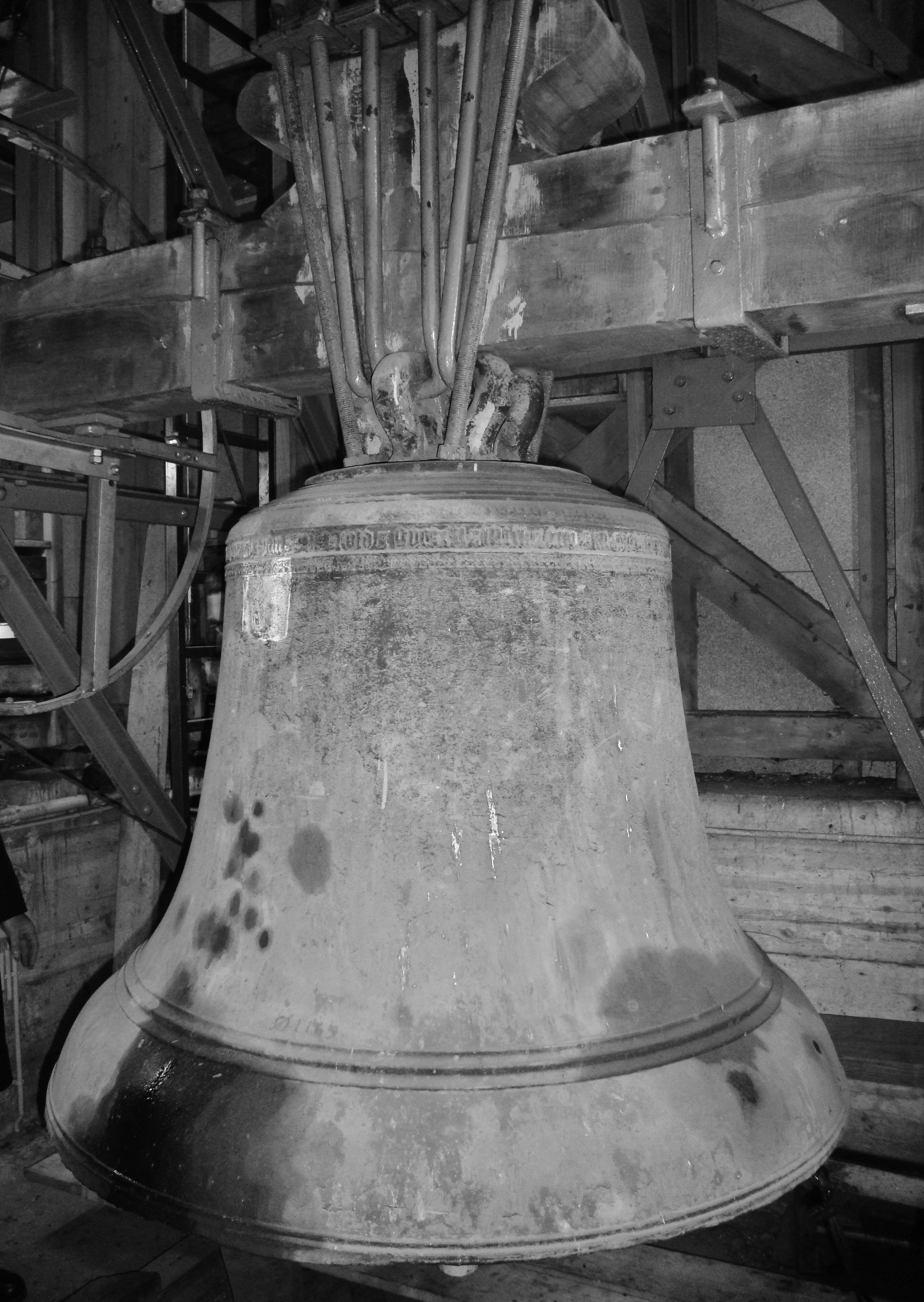 Hürth-Efferen, St. Mariä Geburt: Marienglocke von 1474.